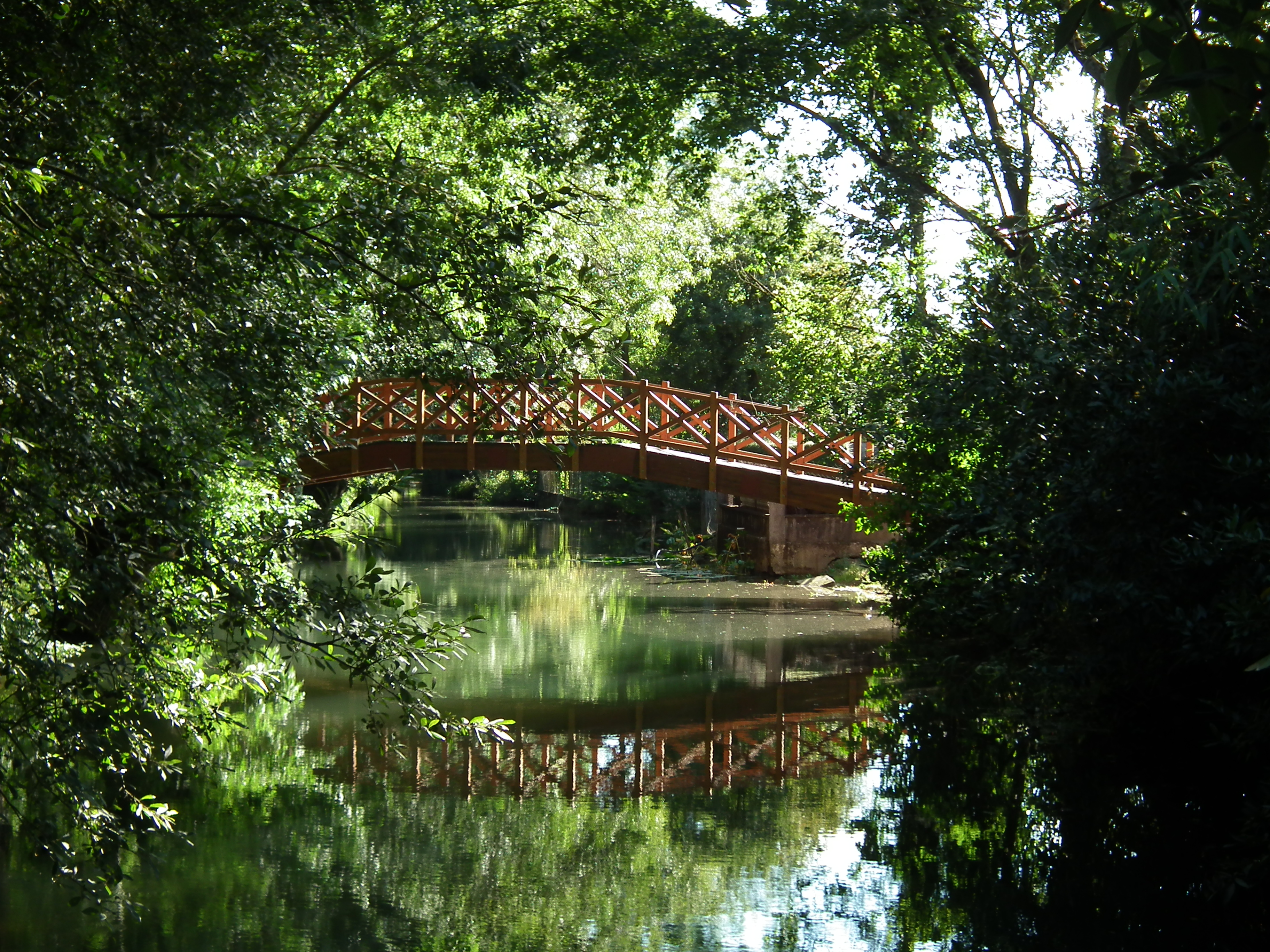 Pont de bois sur la Seugne, Pons